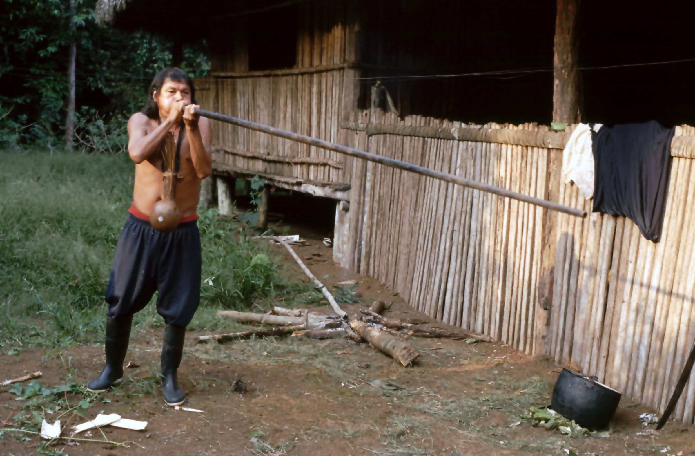 Achuar con cerbatana en la Amazonía Ecuatoriana